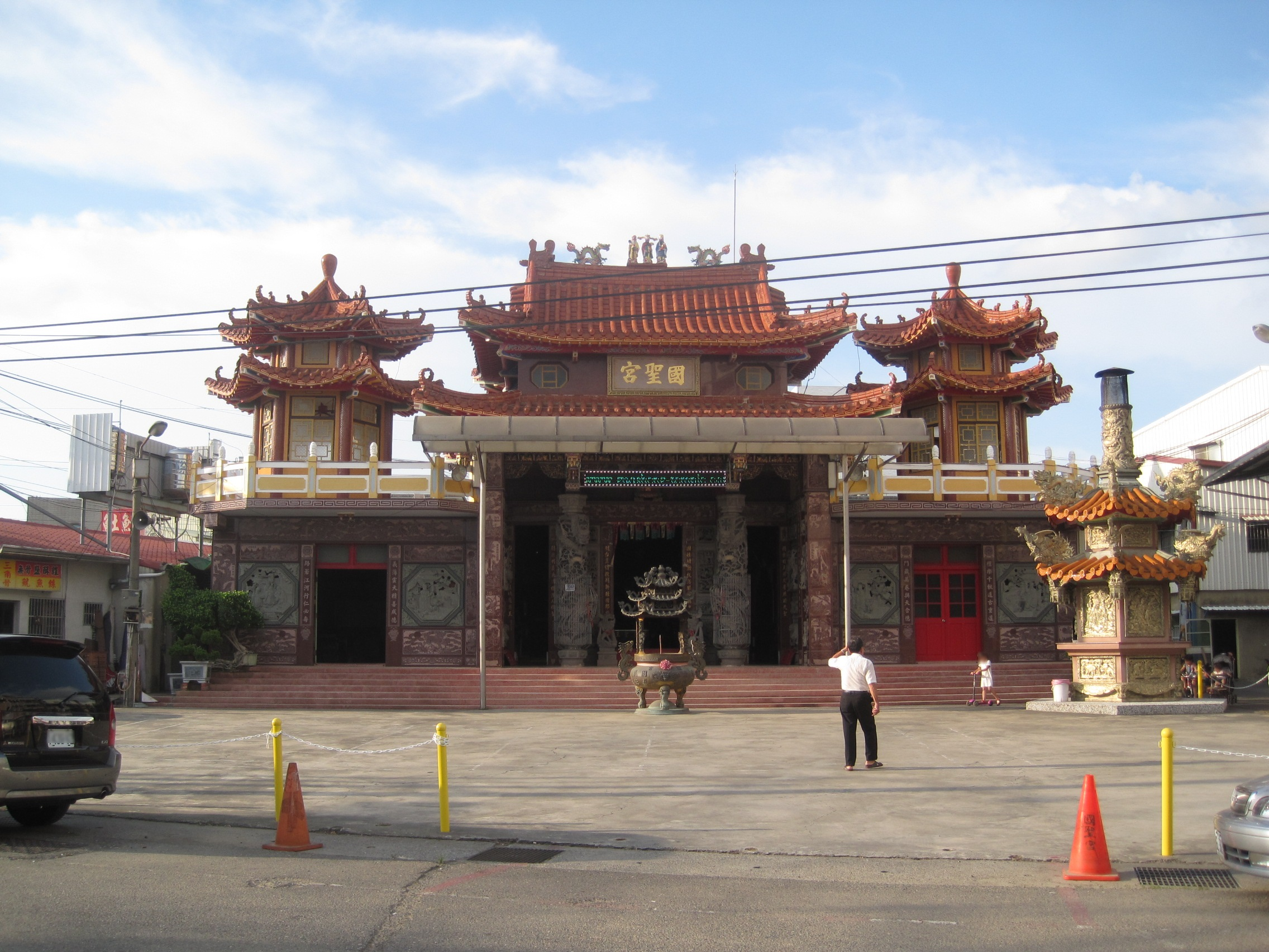 大灣國聖宮